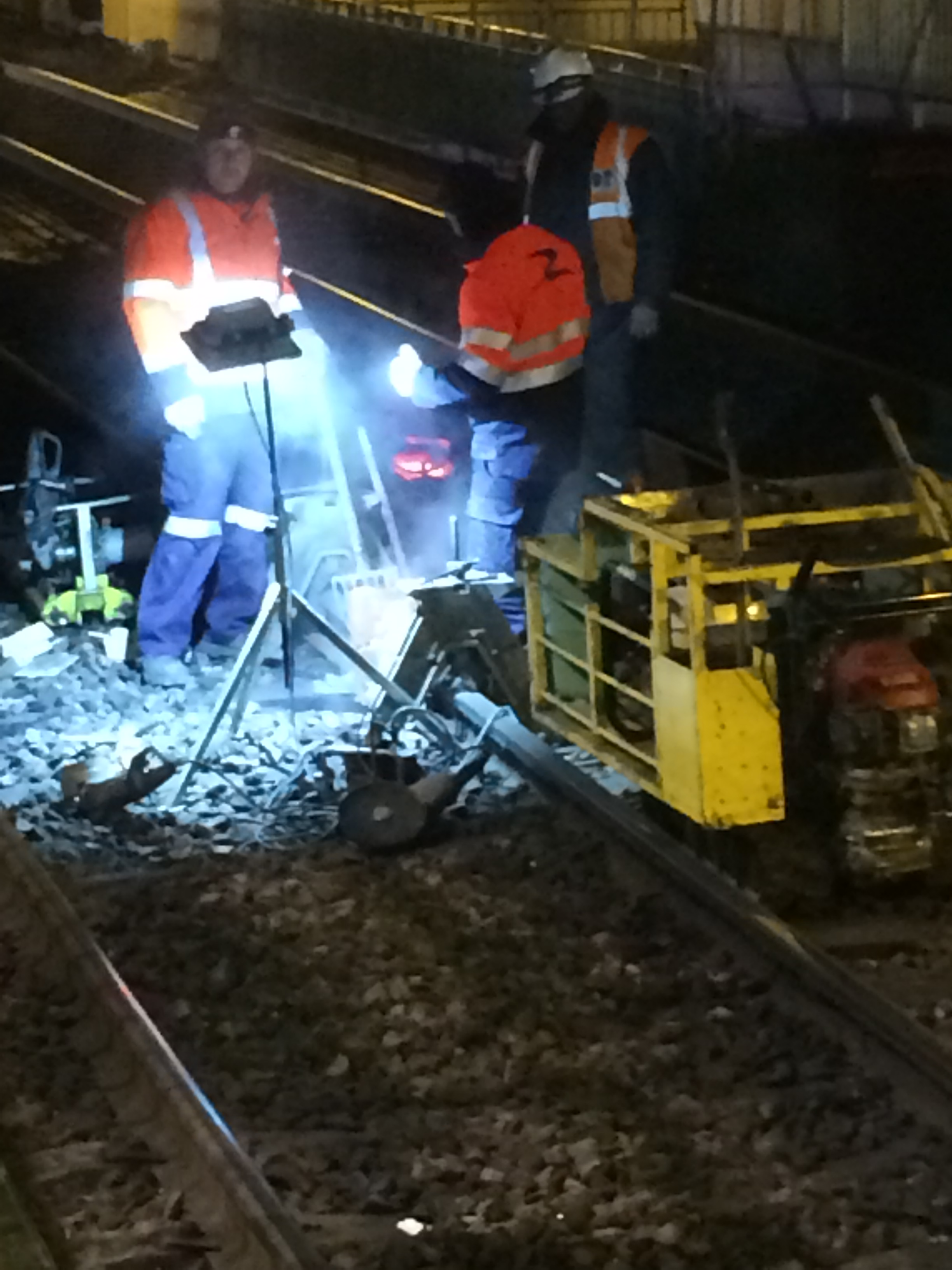 Soudage d'un rail de nuit en gare de La Courneuve-Aubervilliers